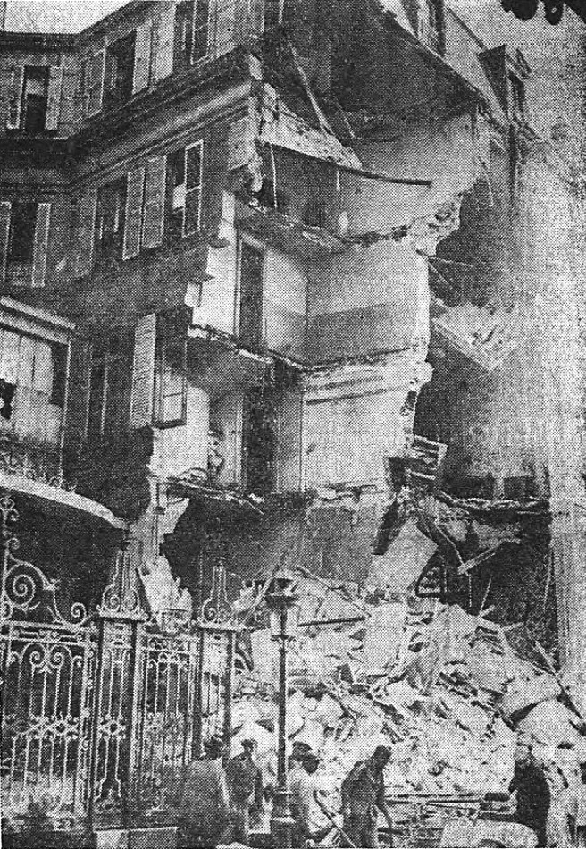 « L'immeuble de la rue de Presbourg après l'explosion. » Attentat perpétré par la Cagoule le 11 septembre 1937 contre le siège de la CGPF, rue de Presbourg, près de la place de l’Étoile. Photographie publiée dans Le Populaire, organe du Parti socialiste (SFIO), n° 5445, 11 janvier 1938.